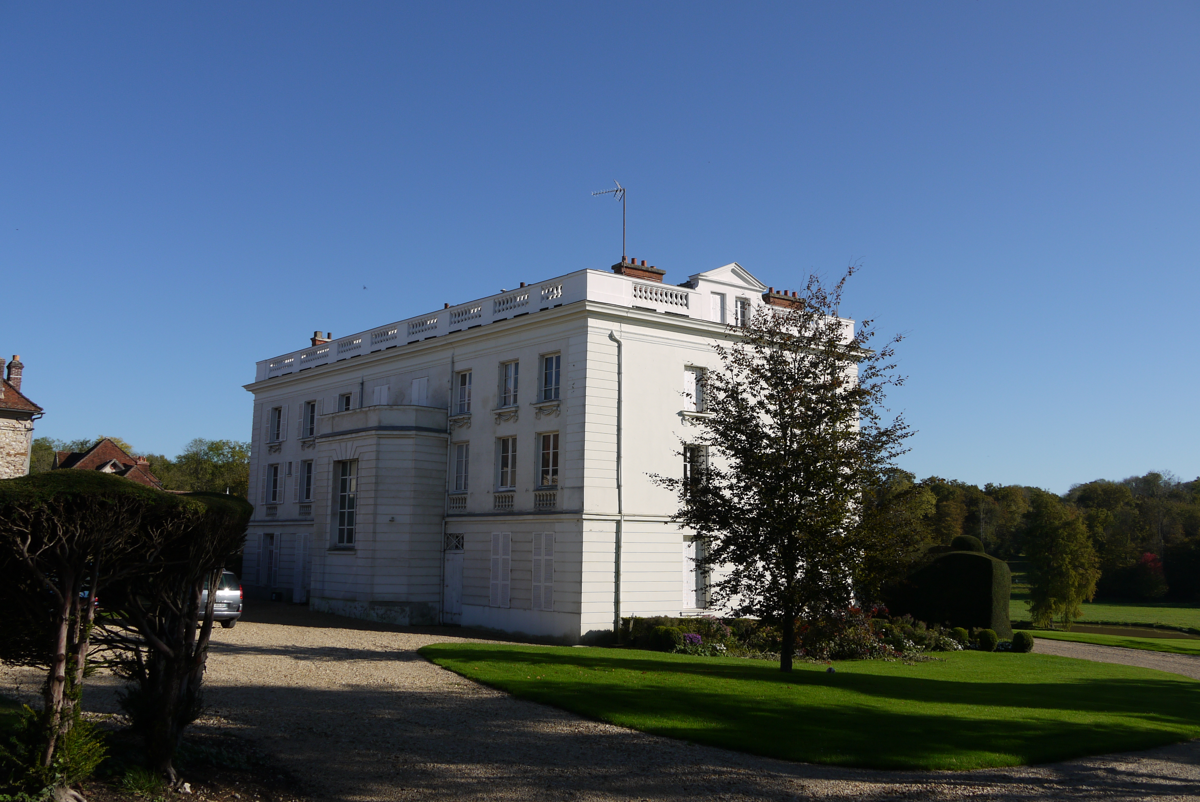 Château et jardins de Viels-Maisons